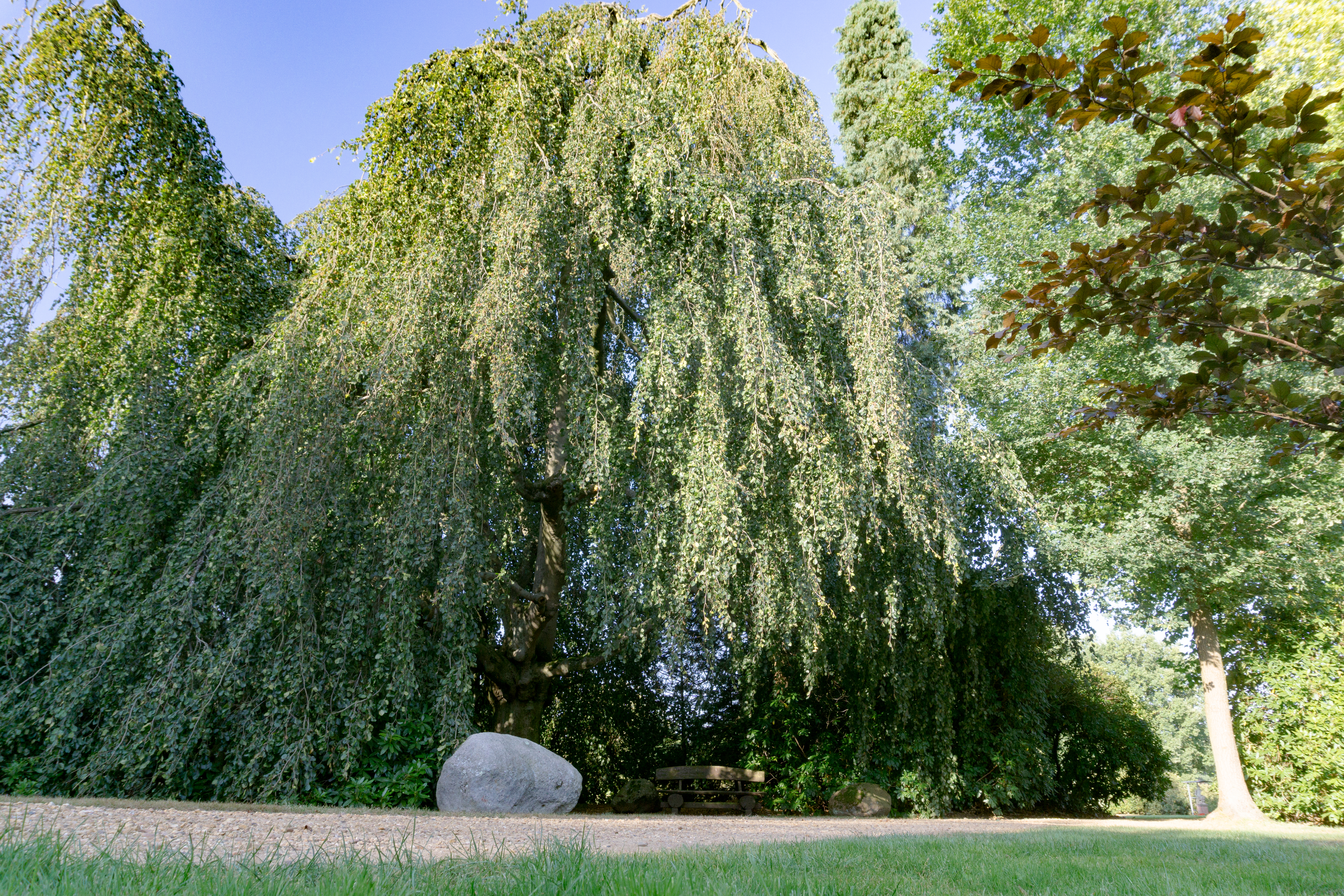 Schloss Lembeck: Hängebuche im Schlossgarten